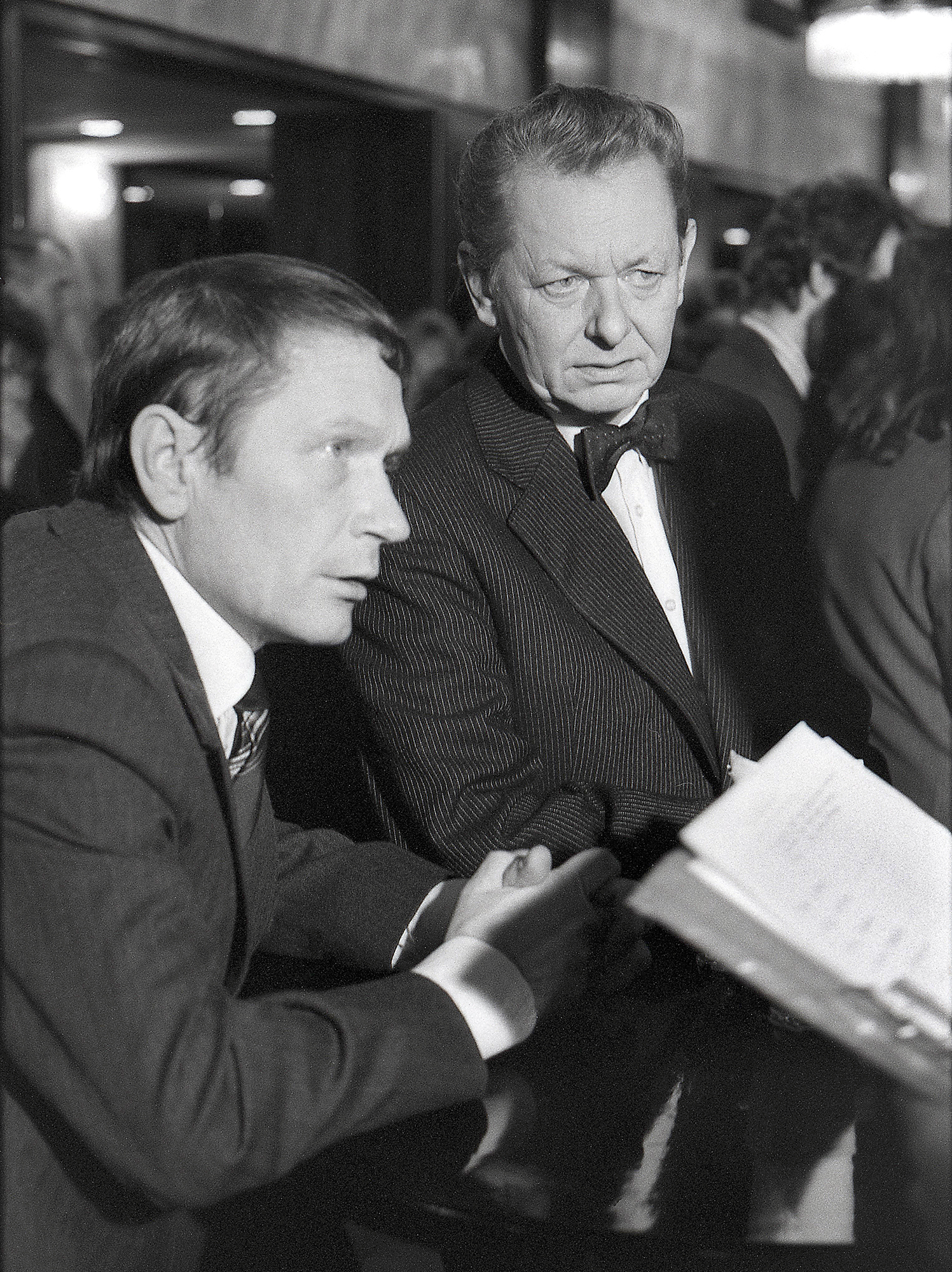 Priit Aimla ja Enn Vetemaa 88